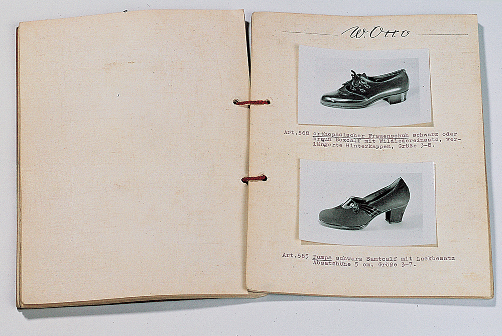 Auszug aus dem ersten Otto-Katalog aus dem Jahre 1950. Dieser ist handgebunden und erscheint in 300 Exemplaren mit eingeklebten Fotos. Auf 14 Seiten werden 28 Paar Schuhe präsentiert.